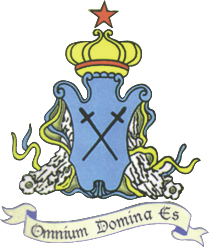 Il logo storico della Contrada La Madonnina, opera di Emilio Buratti (1936-1997)